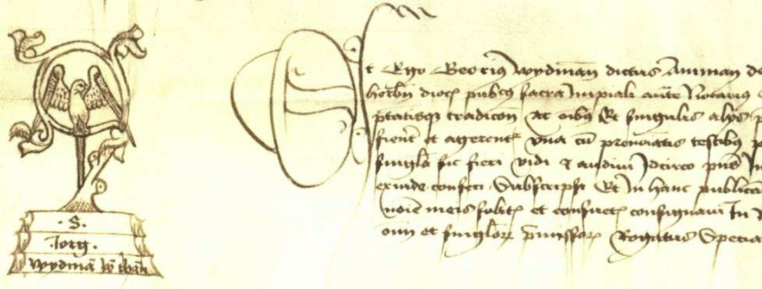 Notariatszeichen des Georg Widmann genannt Ammann von Bühlertann, Kleriker des Würzburger Bistums und kaiserlicher Notar